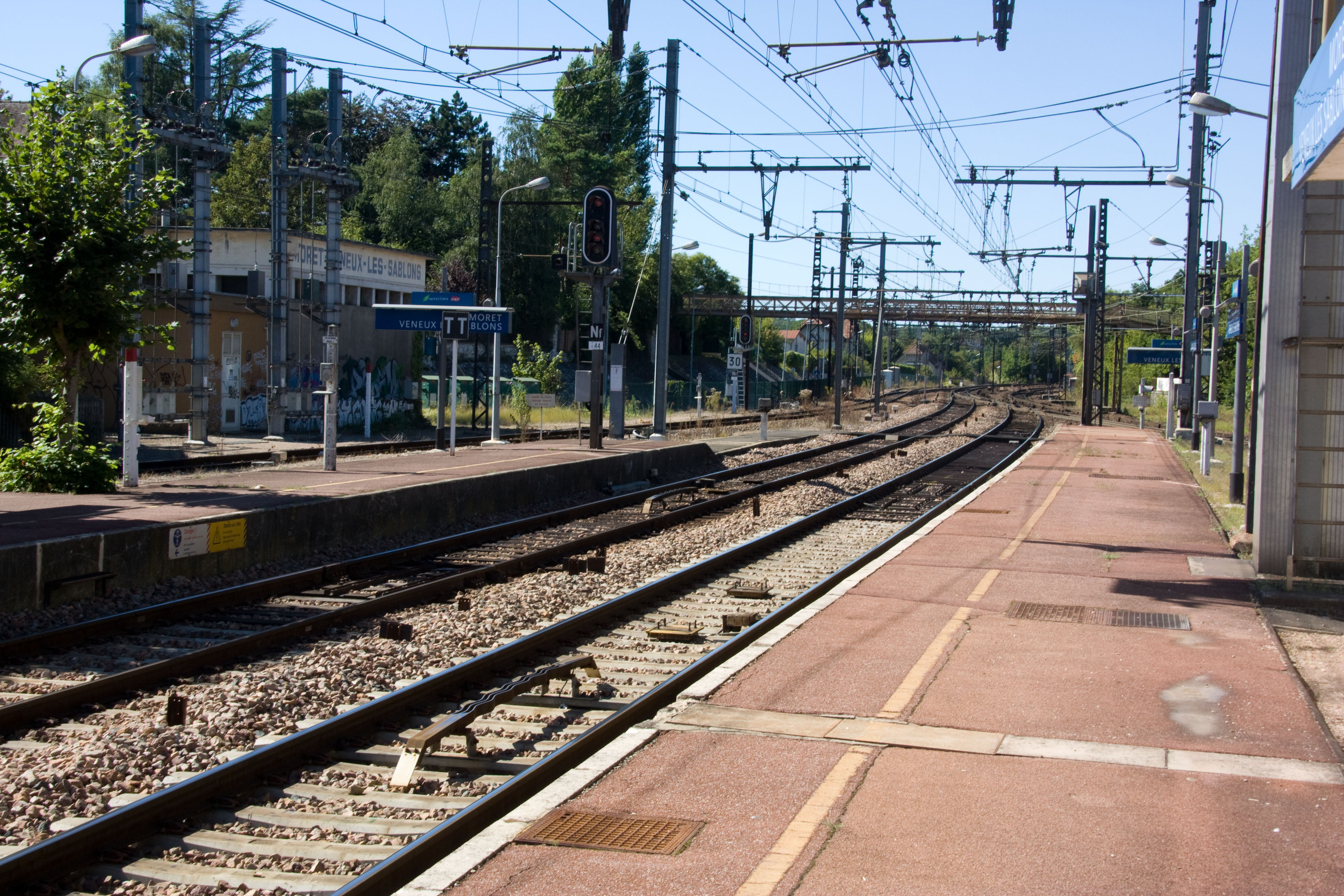 Gare de Moret - Veneux-les-Sablons, Veneux-les-Sablons, Seine-et-Marne, France